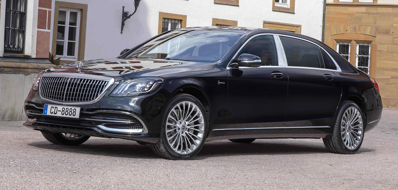 Mercedes-Maybach 650 X222 (2017)